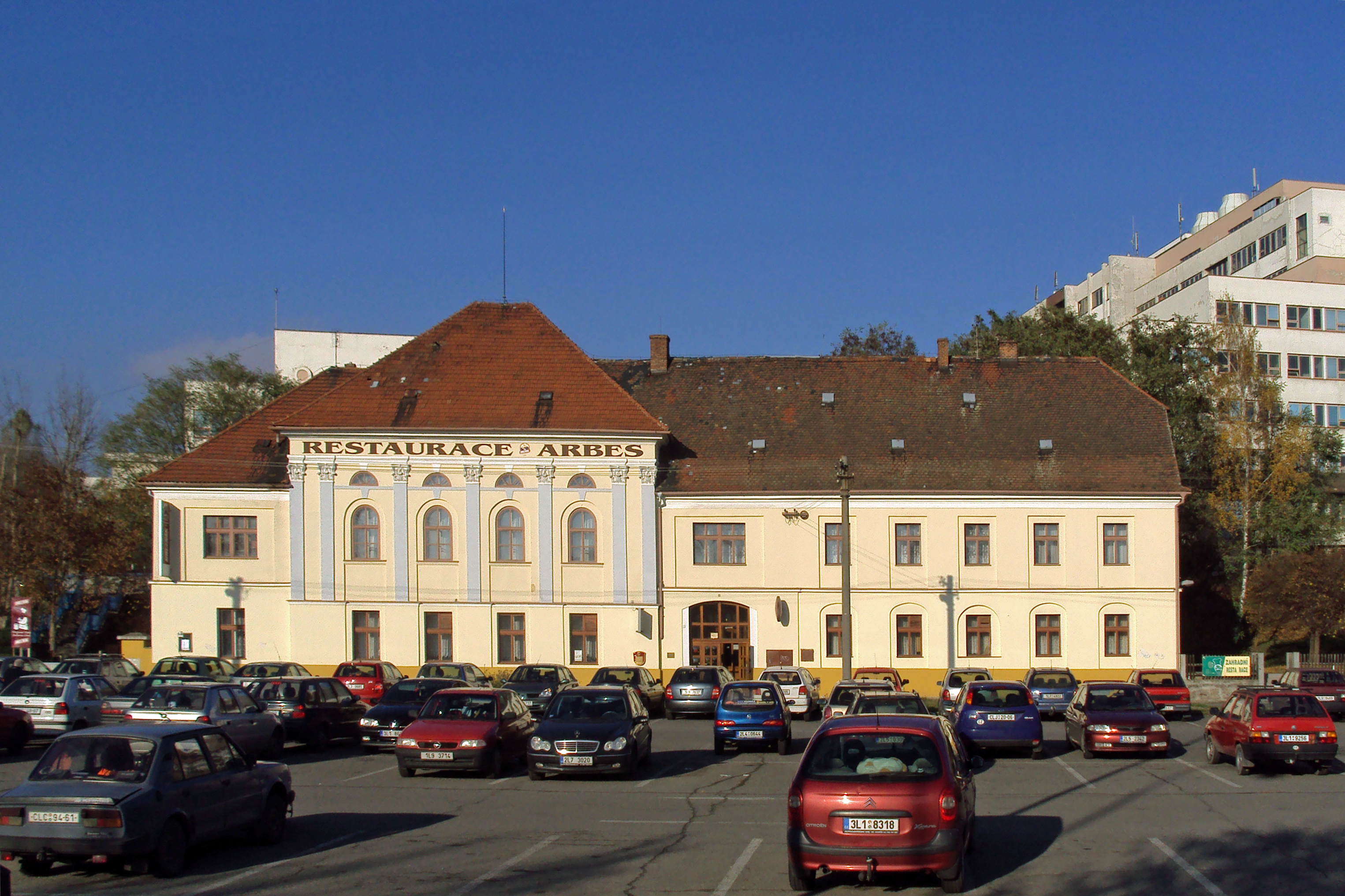 Restaurace Arbes, vpravo budovy nemocnice v České Lípě